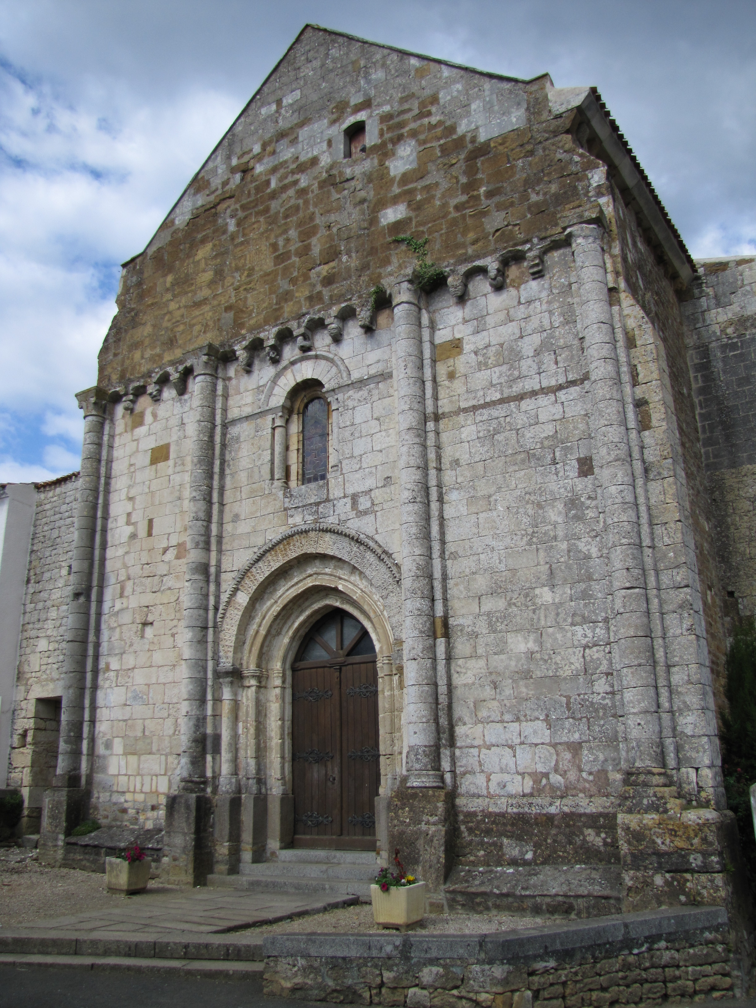 Église Saint-Hilaire de Sérigné, (Inscrit, 1989) .